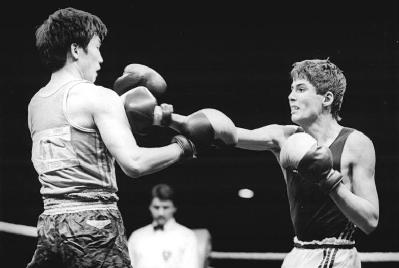 Jo Rjong Sik, Andreas Zülow ADN-ZB Lehmann 28.3.85 Halle: XIV. Internationales Boxturnier um den Chemiepokal-EIne wiederum überzeugende Partie im 57kg-Limit Andreas Zülow (Traktor Schwerin, r.) gegen den Asienmeister Jo Rjong Sik (KDVR). Der DDR-Boxer gewann mit 5:0 Richterstimmen.